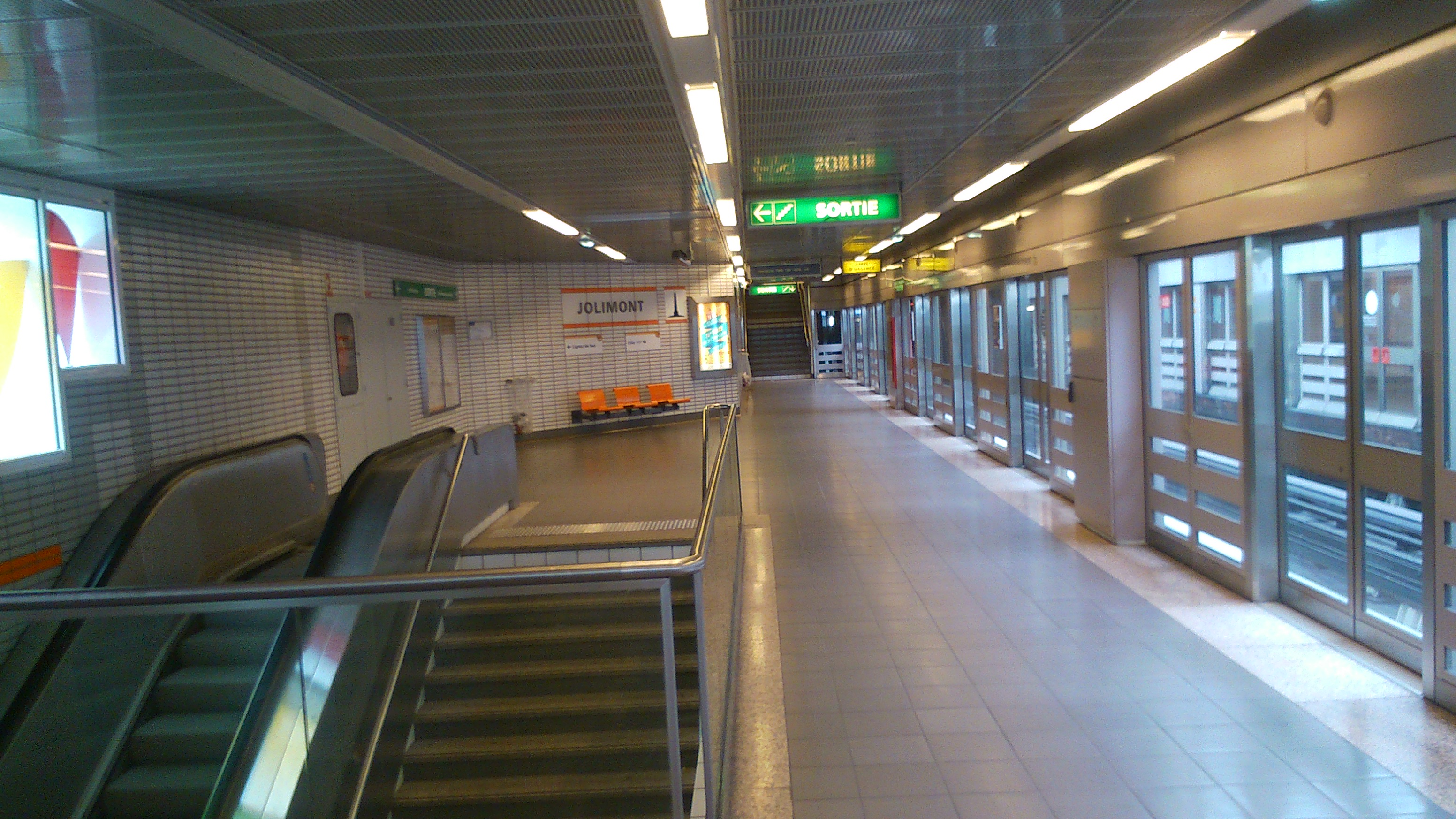 Quai de la station de métro Jolimont à Toulouse